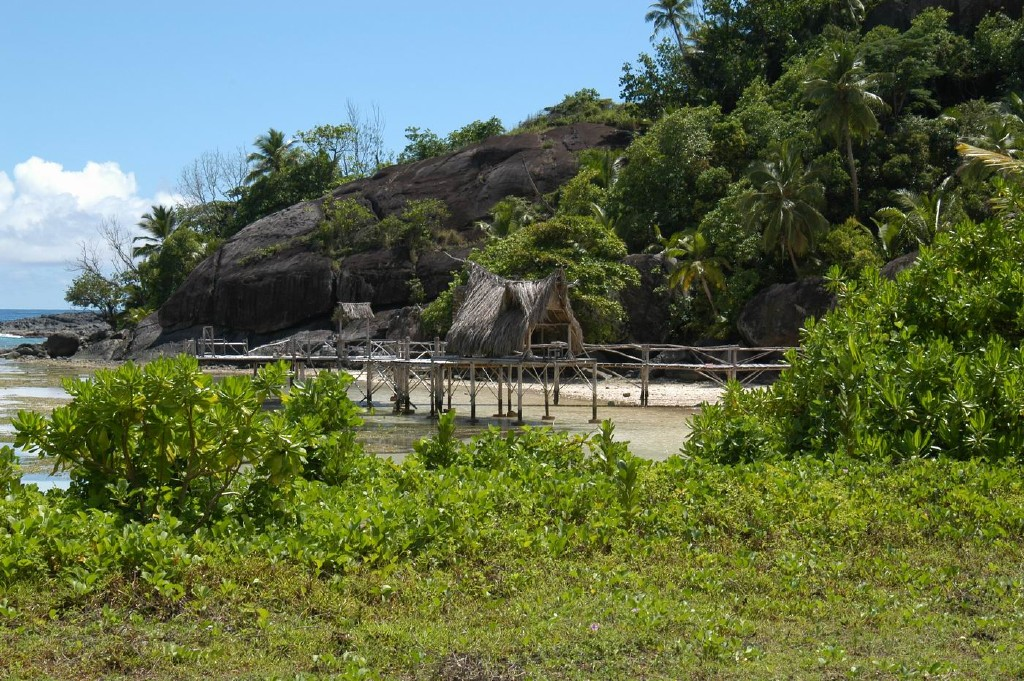 Fischerhütte auf der Insel Silhoutte, Seychellen